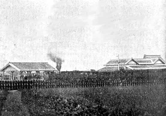 香川県香川郡宮脇村大字西浜にあった旧・高松駅。現在は高松市扇町二丁目の県立盲学校になっている。